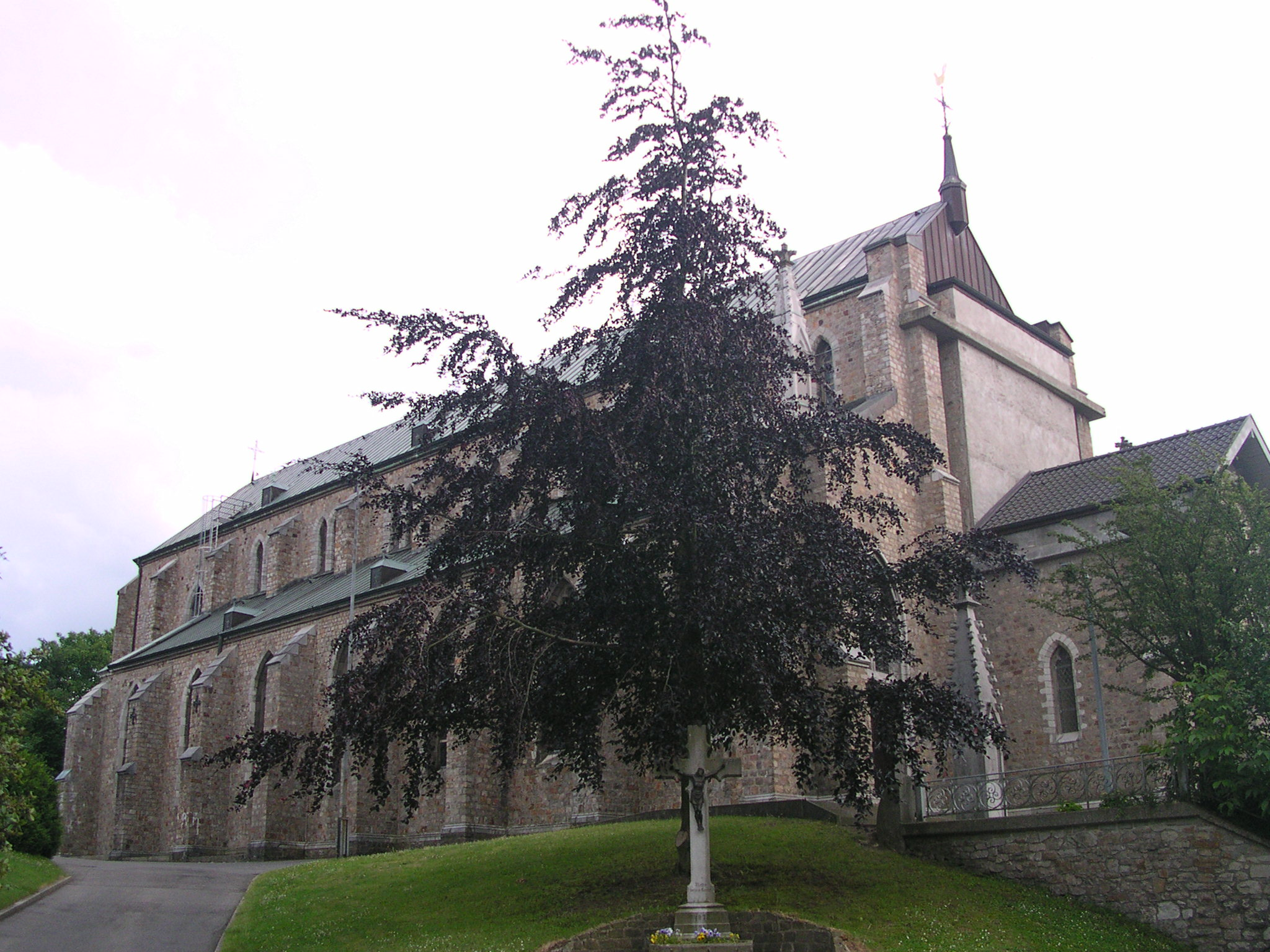 Stolberg-Büsbach, Hubertuskirche nach Abriß des gotischen Turms